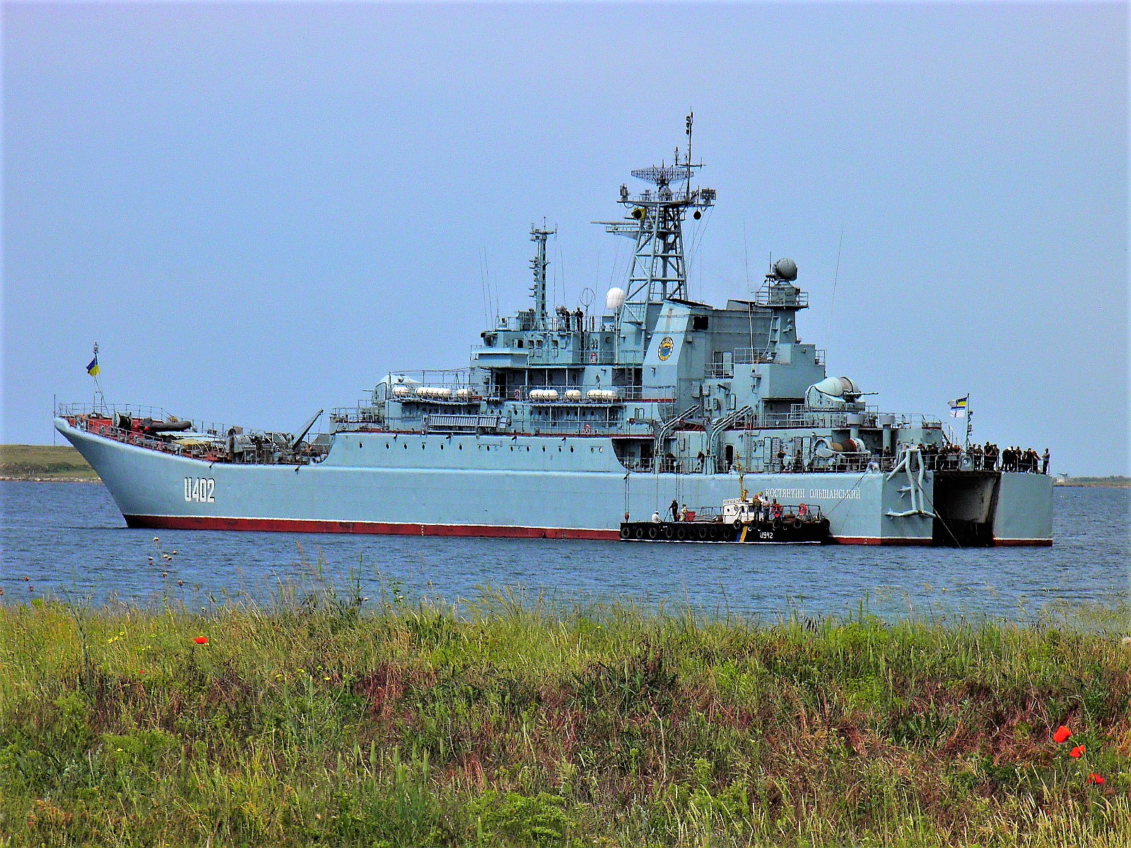 флагман